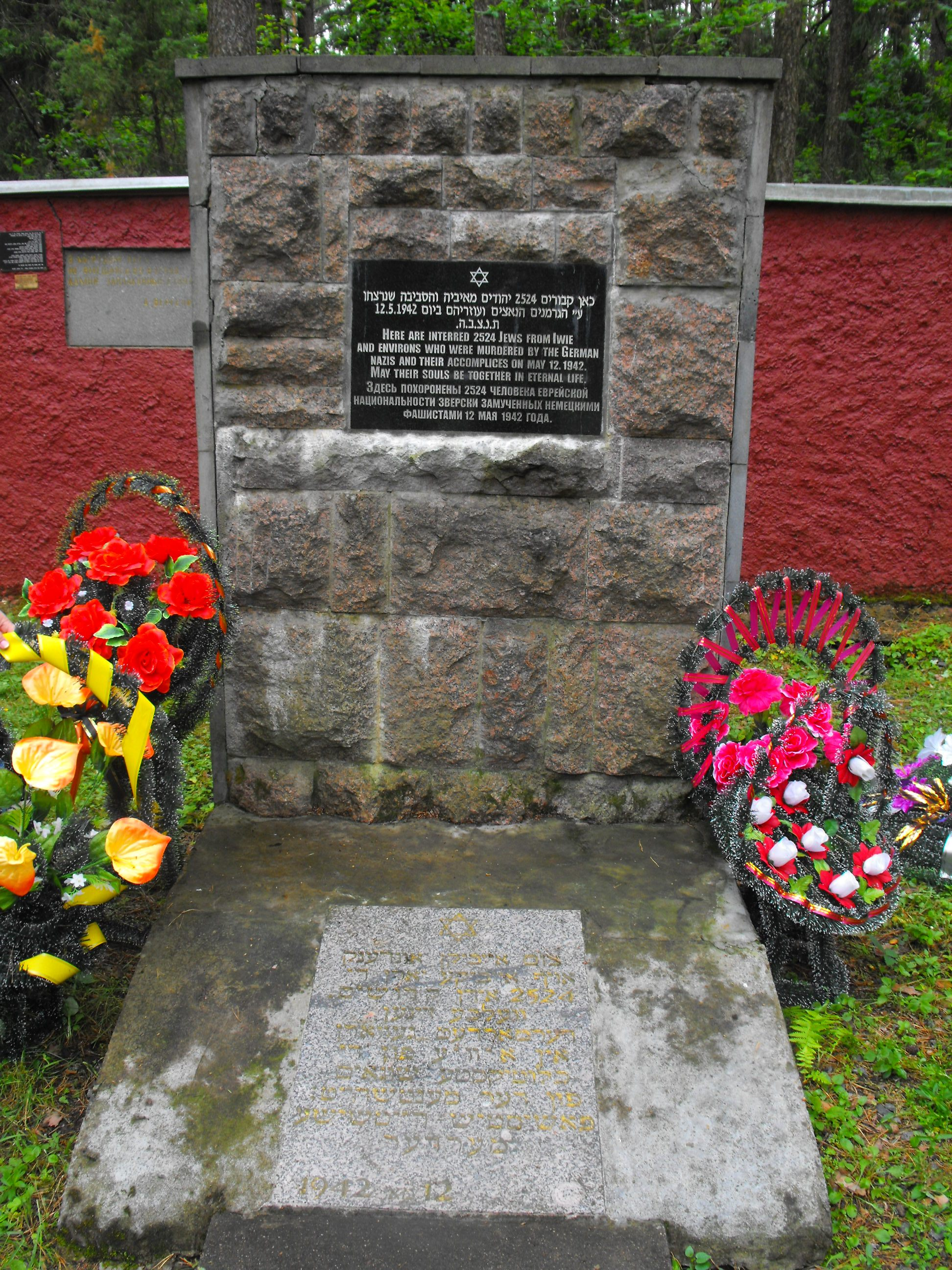 Центральный памятник мемориального комплекса на месте убийства 2 524 евреев Ивье нацистами и полицаями 2 августа 1941 и 12 мая 1942 года. Находится рядом с Ивье, у деревни Стоневичи (урочище Стоневичи), у дороги H-6147.